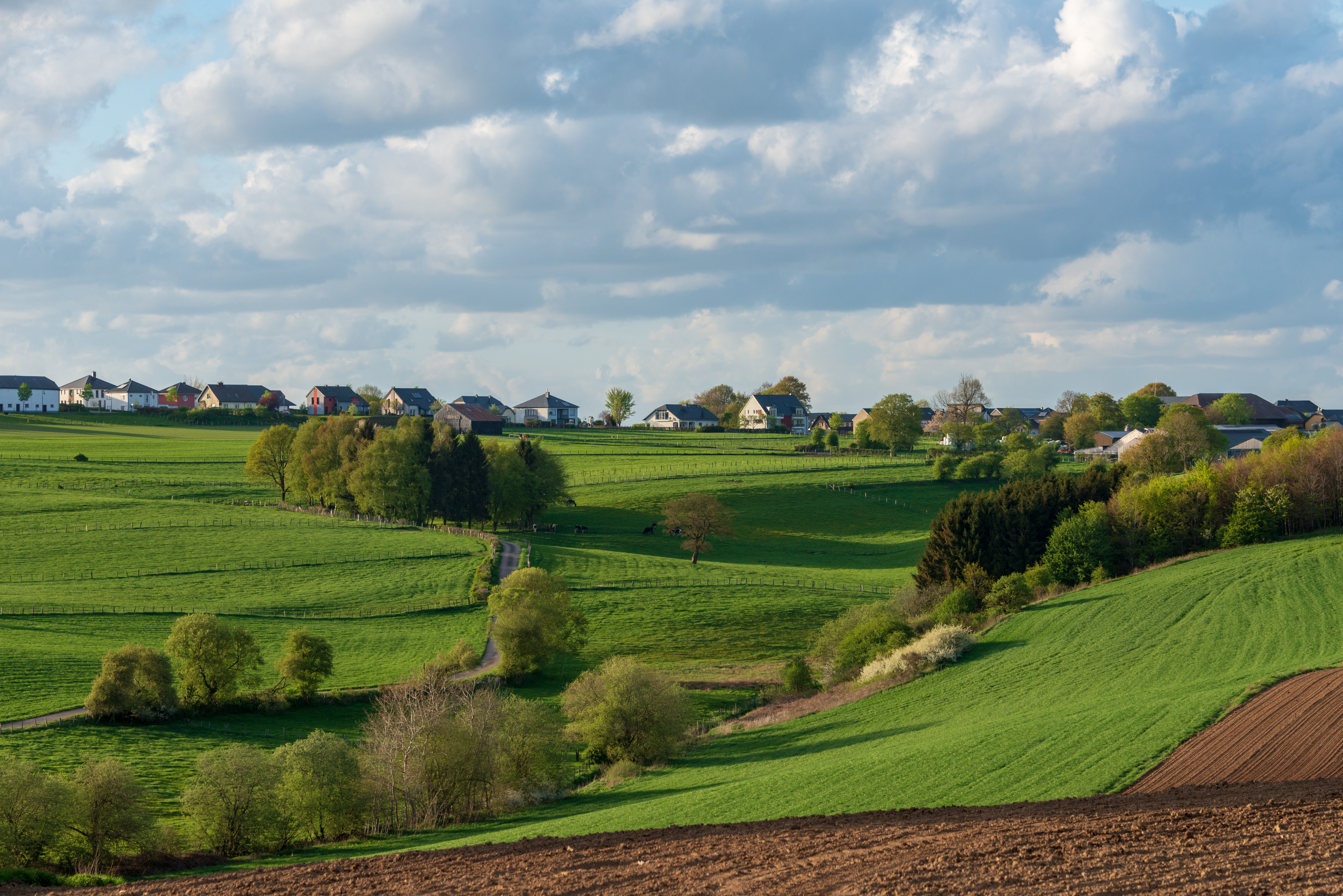 Vue op Fëschbech vu Grandsen.